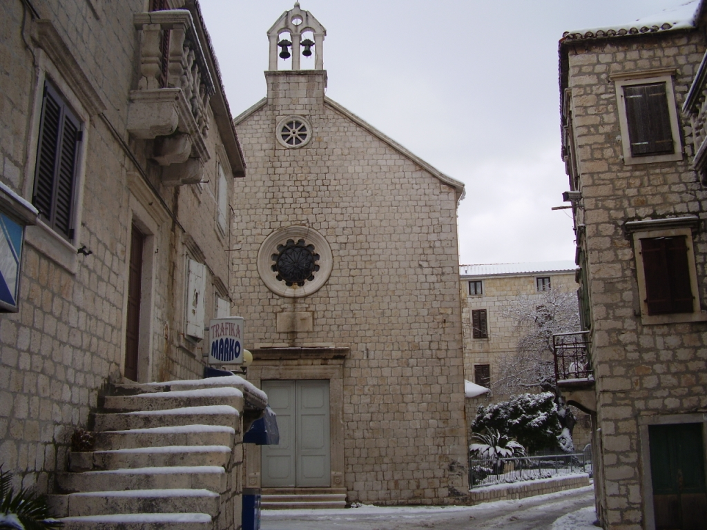 crkva sv.Ivana Krstitelja u Kaštel Starom